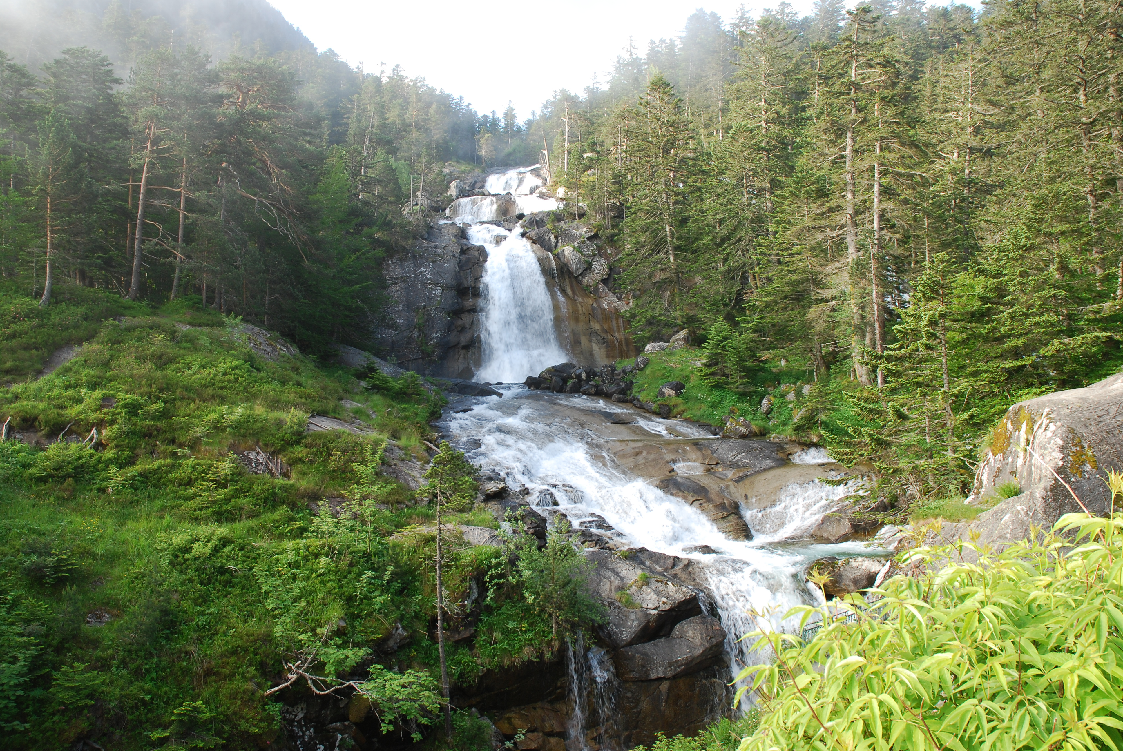 La cascade du Pont d'Espagne sur la branche centrale du gave de Gaube, Cauterets, Hautes-Pyrénées, France.